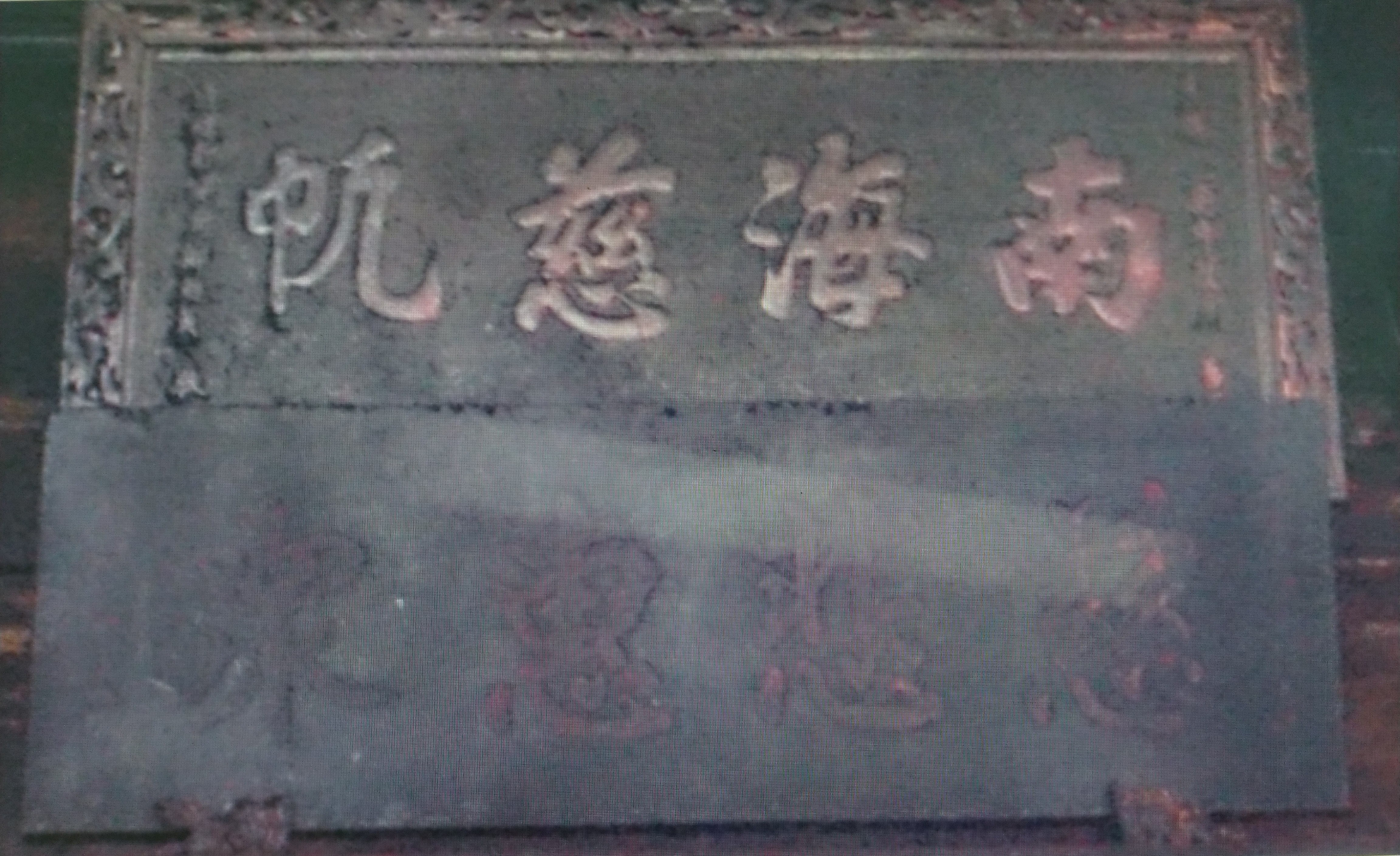 內門紫竹寺《南海慈航》匾(光緒十一年道標都閫府鄭超英敬獻)